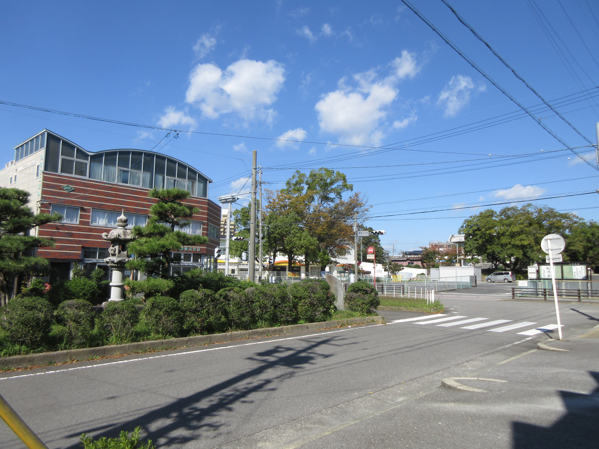 曙町2丁目交差点（岡崎市曙町）